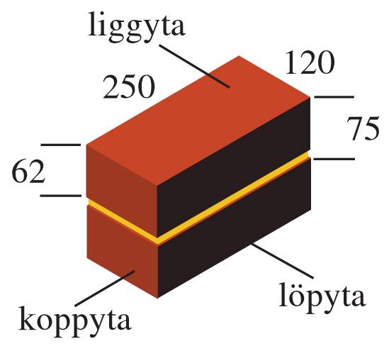 Standardtegelsten. Mått 250 x 120 x 62 mm. Ger tillsammans med 13 mm fog en bygghöjd på 75 mm.